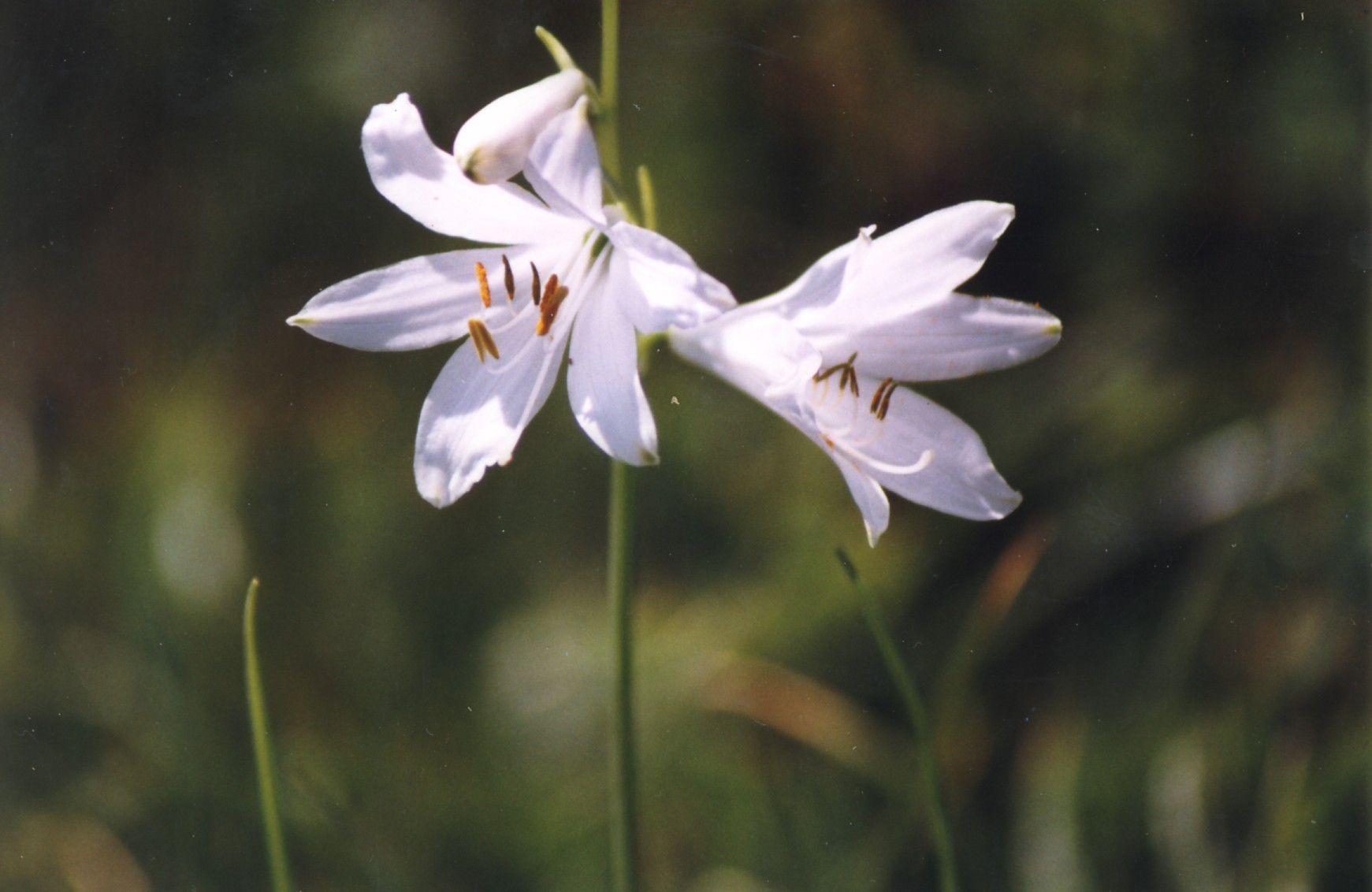 Lys de la St. Bruno